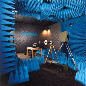 Chambre-anechoique